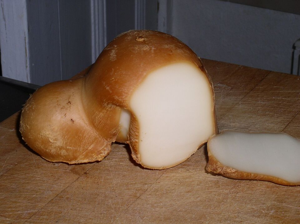 Scamorza - italienischer Räucherkäse